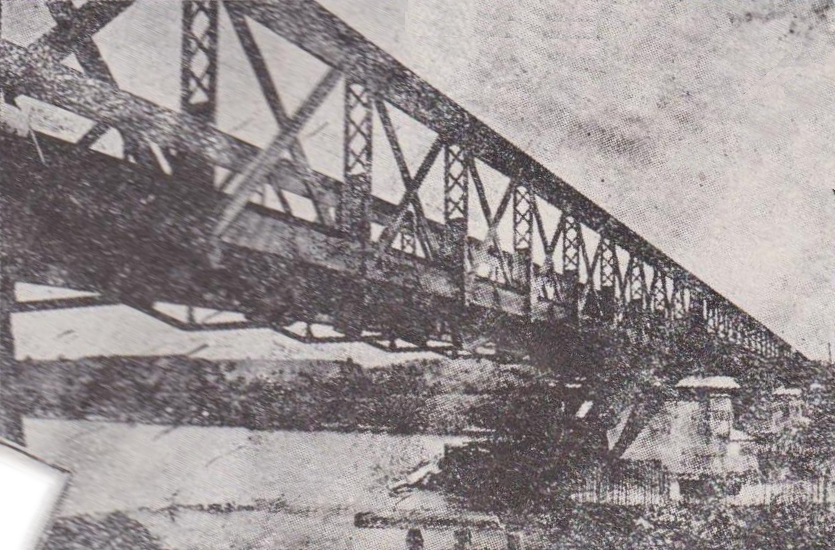 Puente Pilmaiquén. Circa 1929. Puente ubicado en la línea Santiago-Puerto Montt, entre las estaciones La Unión y Trumao. Imagen obtenida a partir del libro (in Spanish) (1929) Ferrocarriles del Estado de Chile (3rd ed.), Santiago: Impr. Harris y Pascual